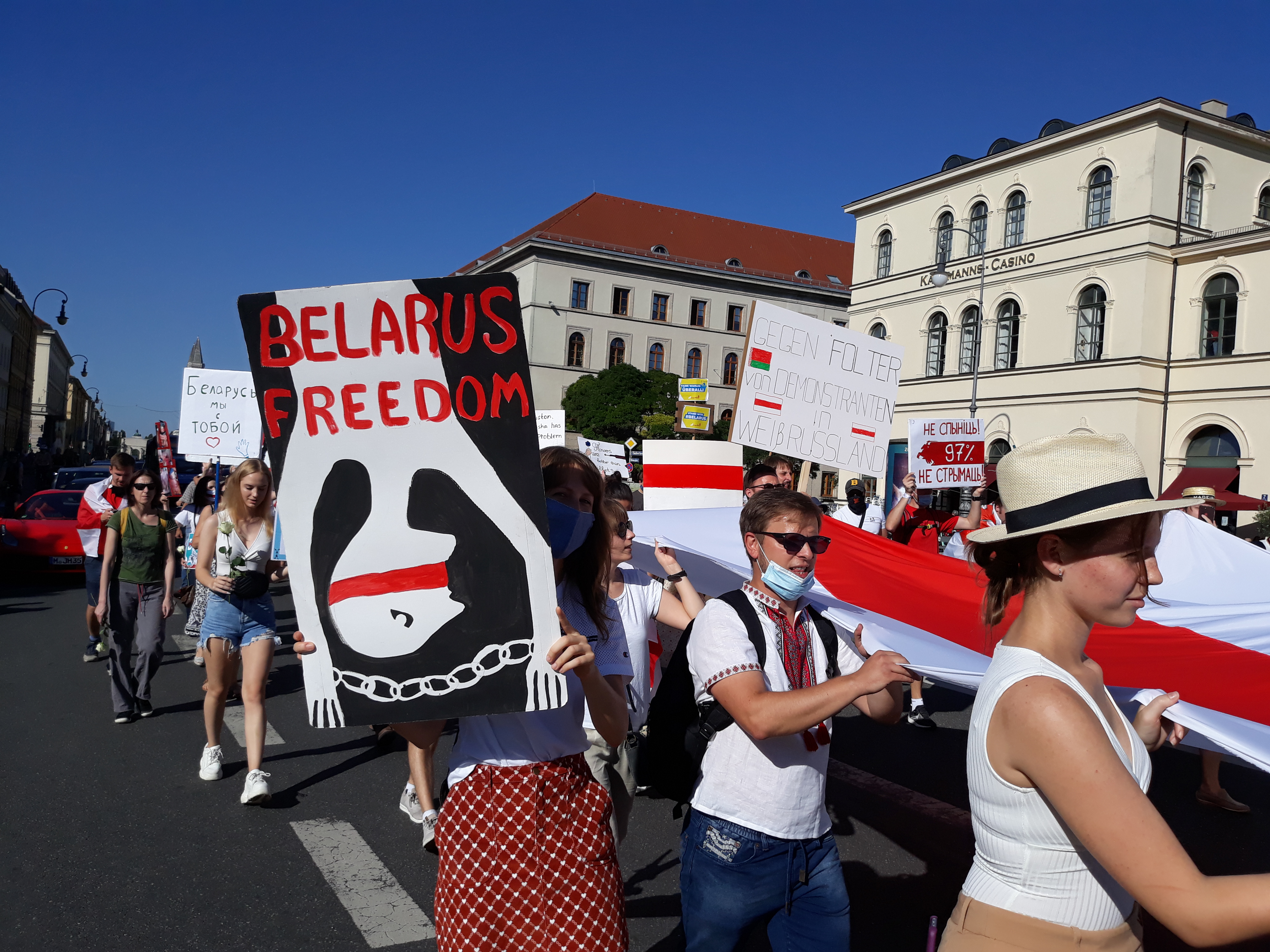 Protestzug gegen die Diktatur in Belarus. Odeonsplatz, München am 21. August 2002